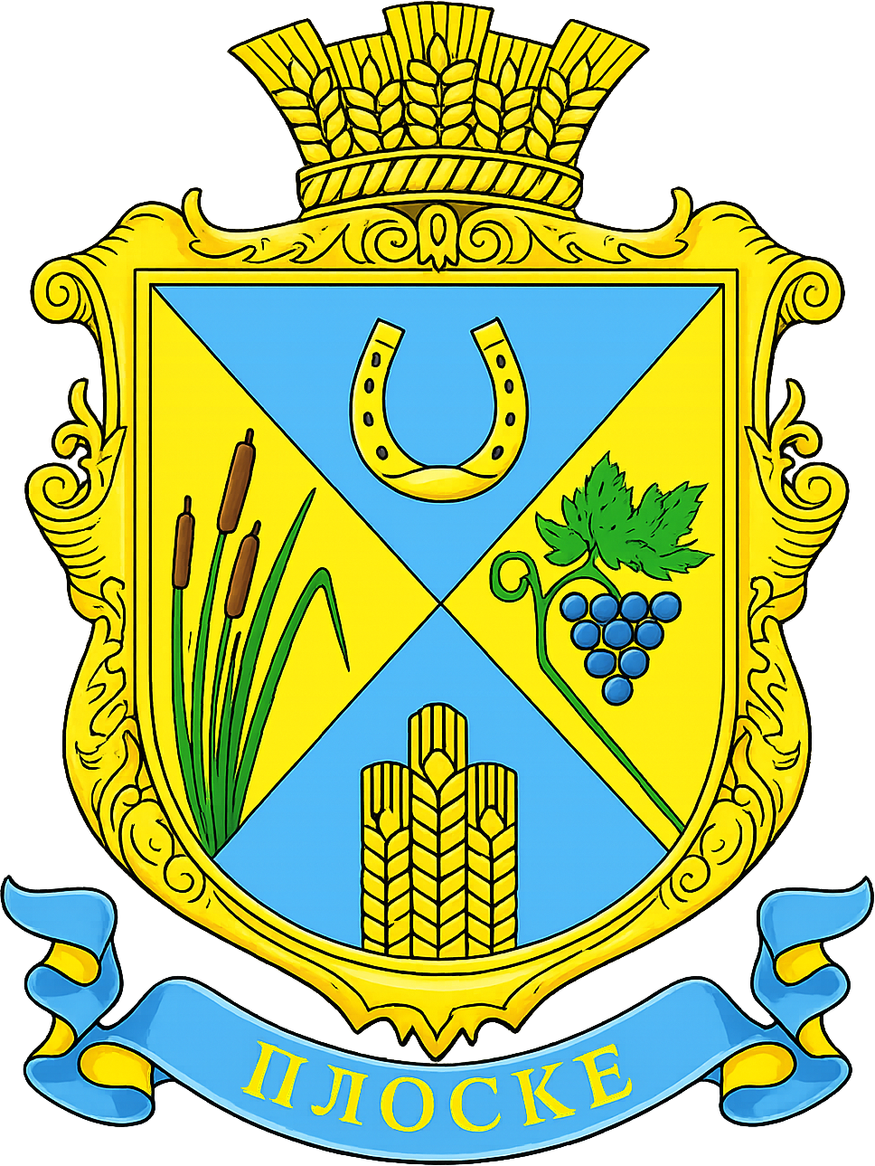 Герб села Плоске (Балтський район)